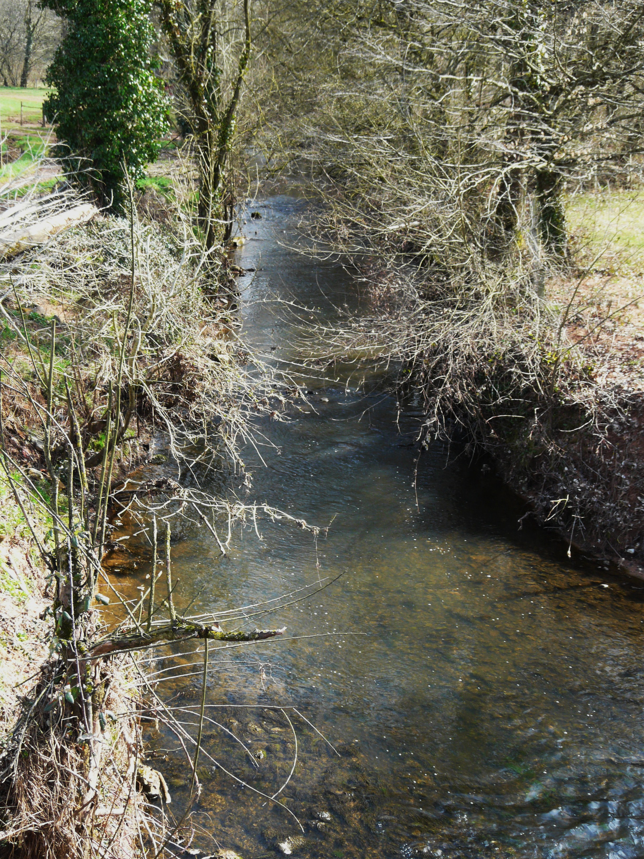 Ruisseau la Lourde, au pont de la RD5, vue vers l'amont, Saint-Martial-Laborie, Cherveix-Cubas, Dordogne, France